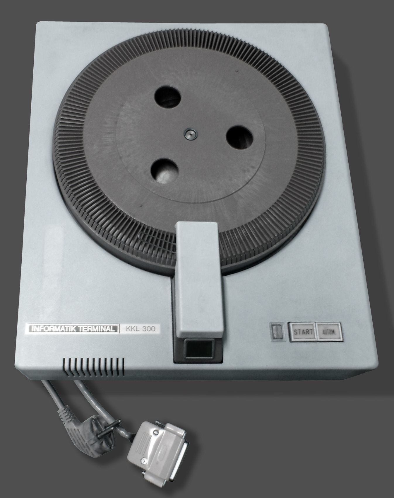 Informatik Terminal, KleinKartenLeser 300 der Firma SEL. Ein Datenendgerät, das hauptsächlich im Zusammenhang mit Parallelmodems zum Einsatz kam.